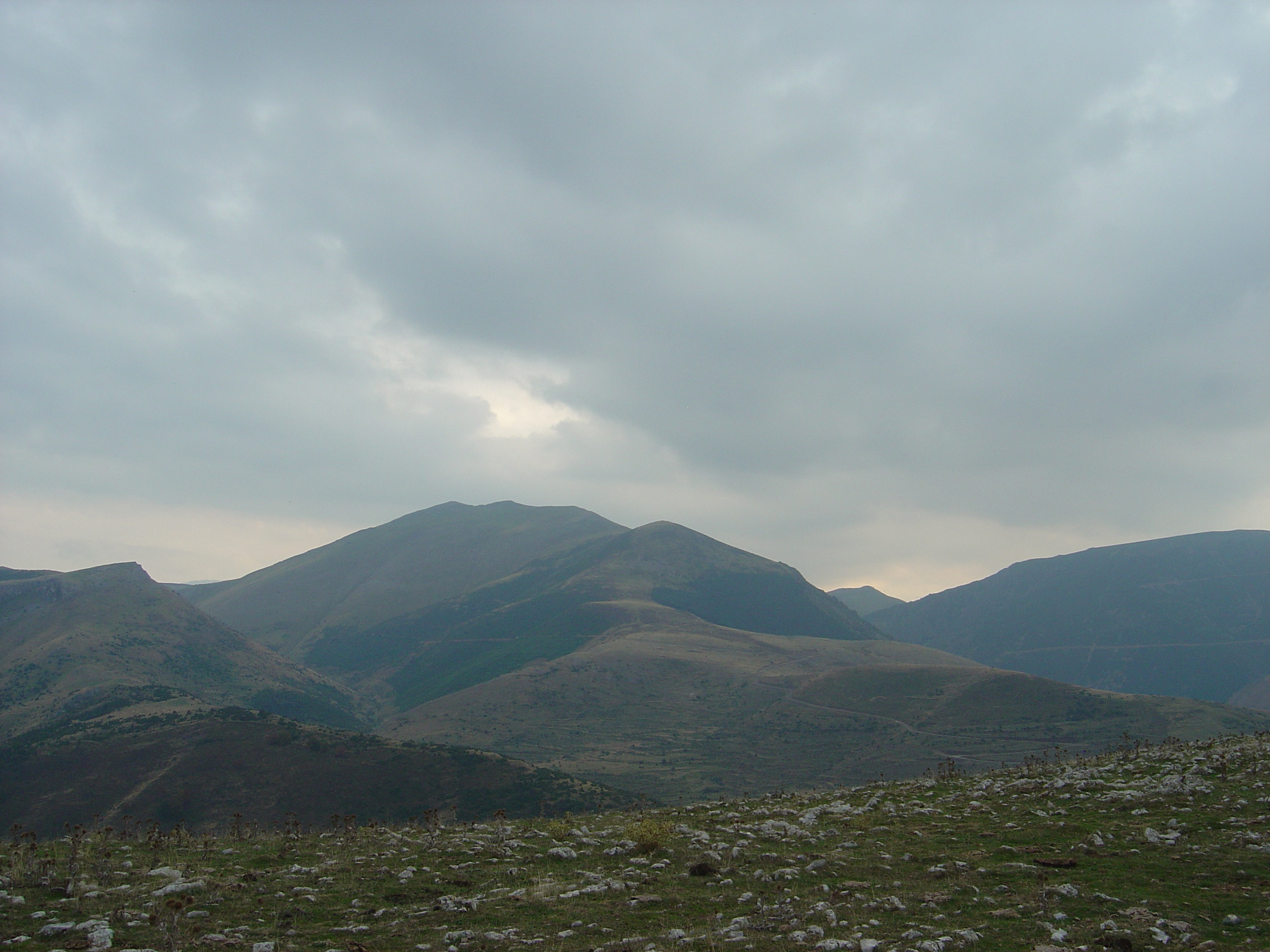 Cabezo del Santo. Sierra de Castejón. Brieva. La Rioja. Spain